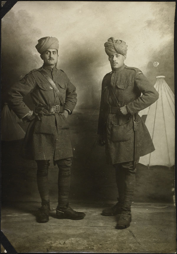 Title / Titre : More neighbors / D'autres voisins Creator(s) / Créateur(s) : Éditions Arnault Date(s) : 1917 Reference No. / Numéro de référence : e007150768, MIKAN 1965681 Location / Lieu : Le Tréport, France Credit / Mention de source : Éditions Arnault. Library and Archives Canada / Éditions Arnault. Bibliothèque et Archives Canada. Description / Descriptions : Unidentified members of the Indian Medical Service, Le Tréport, France. / Membres non identifiés du service médical indien, Le Tréport, France.